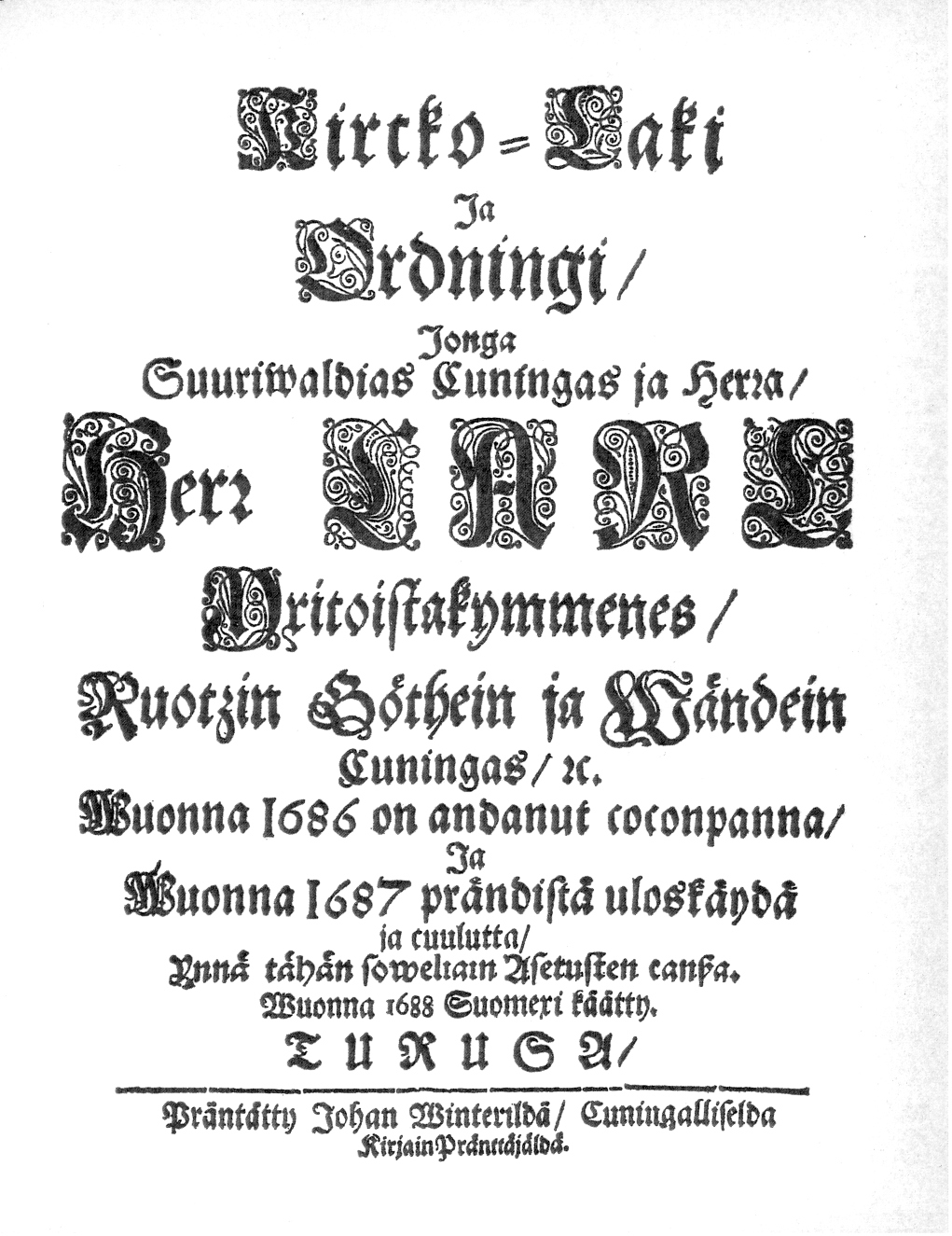 Vuoden 1686 kirkkolain suomennoksen nimiö.